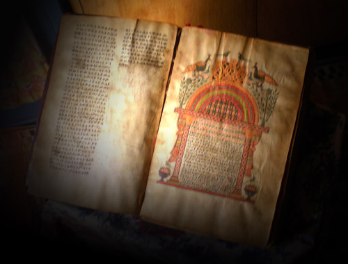 Bible from the XII-XIII century on a monastery on Lake Tana, Ethiopia (Bible datant du 12-13ème siècle dans un monastère sur le Lac tana, Ethiopie - photo personnelle prise le 10 décembre 2007)